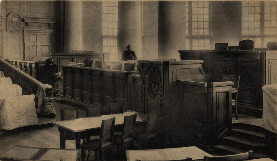 Государственная Дума. Трибуна председателя и места министров.